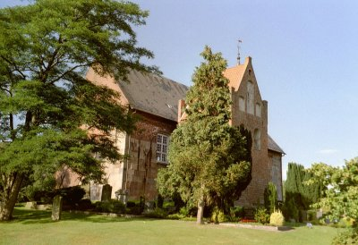 St.-Martins-Kirche Zetel